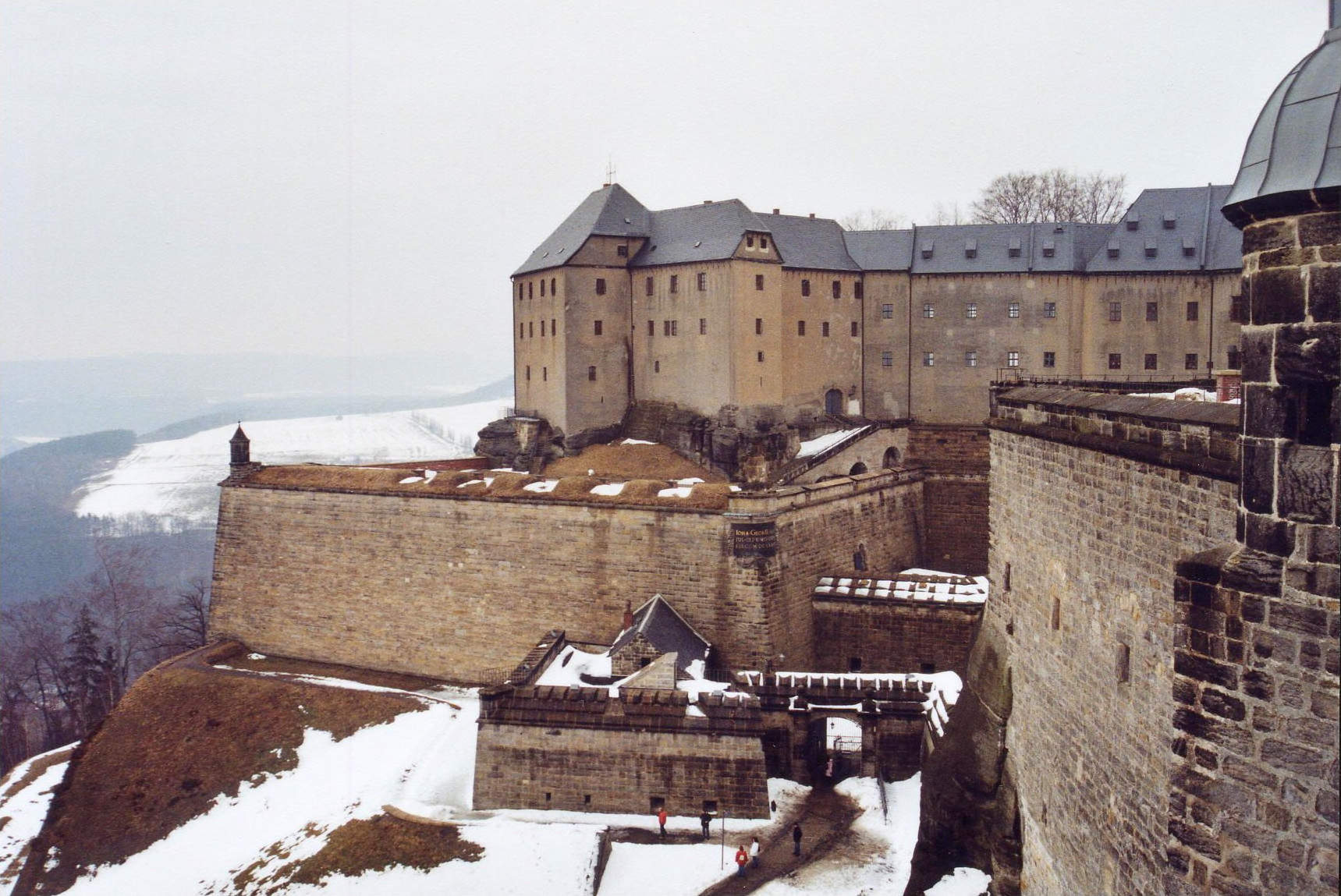 Une partie des bâtiments d'entrée de la forteresse de Königstein occupant un promontoire (butte témoin) de 9,5 hectares qui domine la courbe de l'Elbe et le bourg de Königstein à 30 kilomètres au sud-est de Dresde en Saxe (Allemagne).